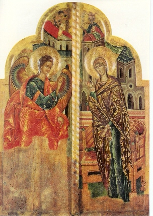 Iconostase d'église de Carligi public domain